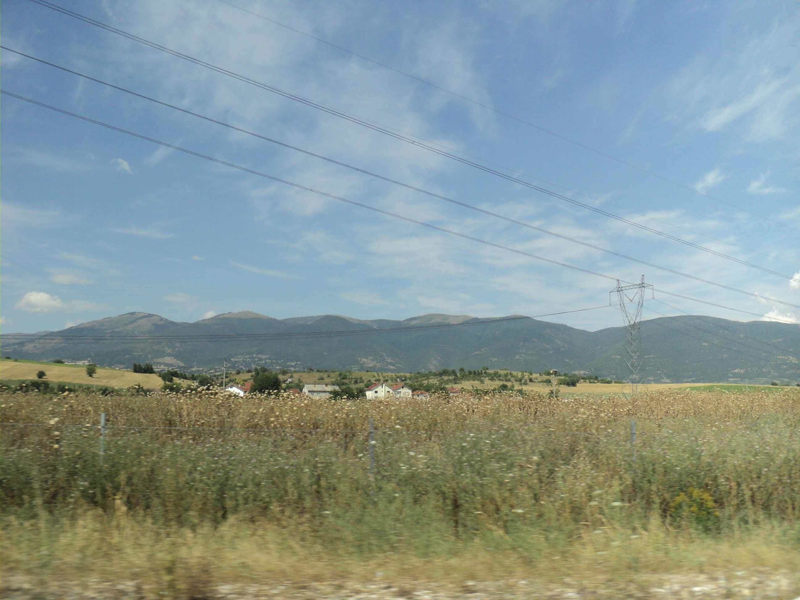 Skopska Crna gora, pogled sa juga